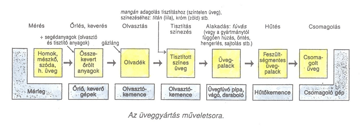 Az üveggyártás technológiájának műveletsora.